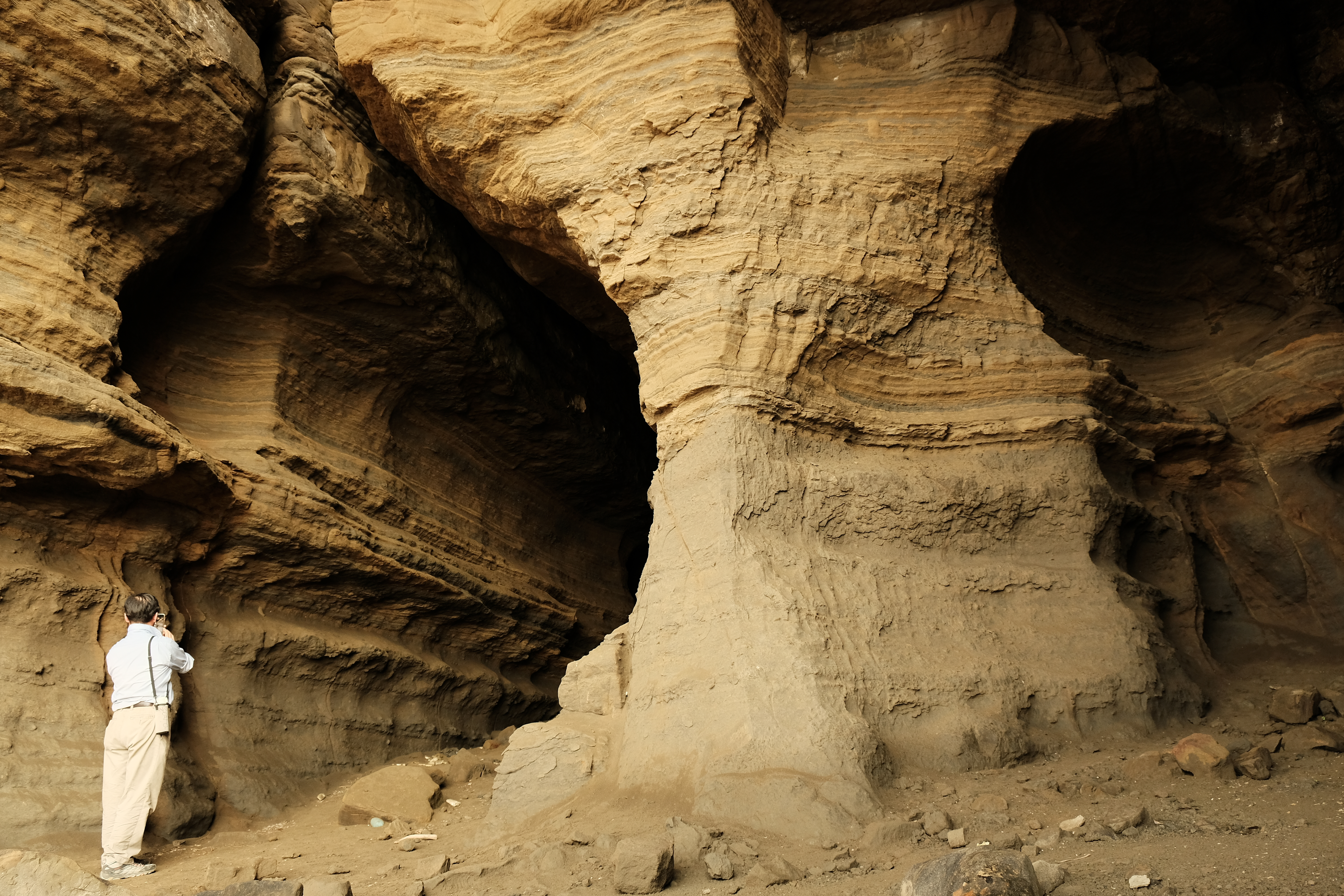 2019 Sea caves of Bitou Cape 瑞芳區鼻頭角海蝕洞